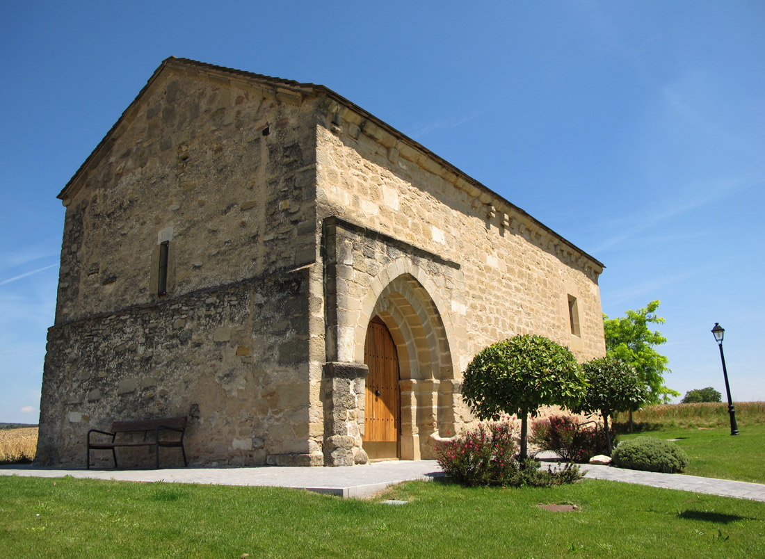 Ermita de San Juan y de la Magdalena en Rivabellosa (Ribera Baja/Erribera Beitia, Álava, País Vasco).